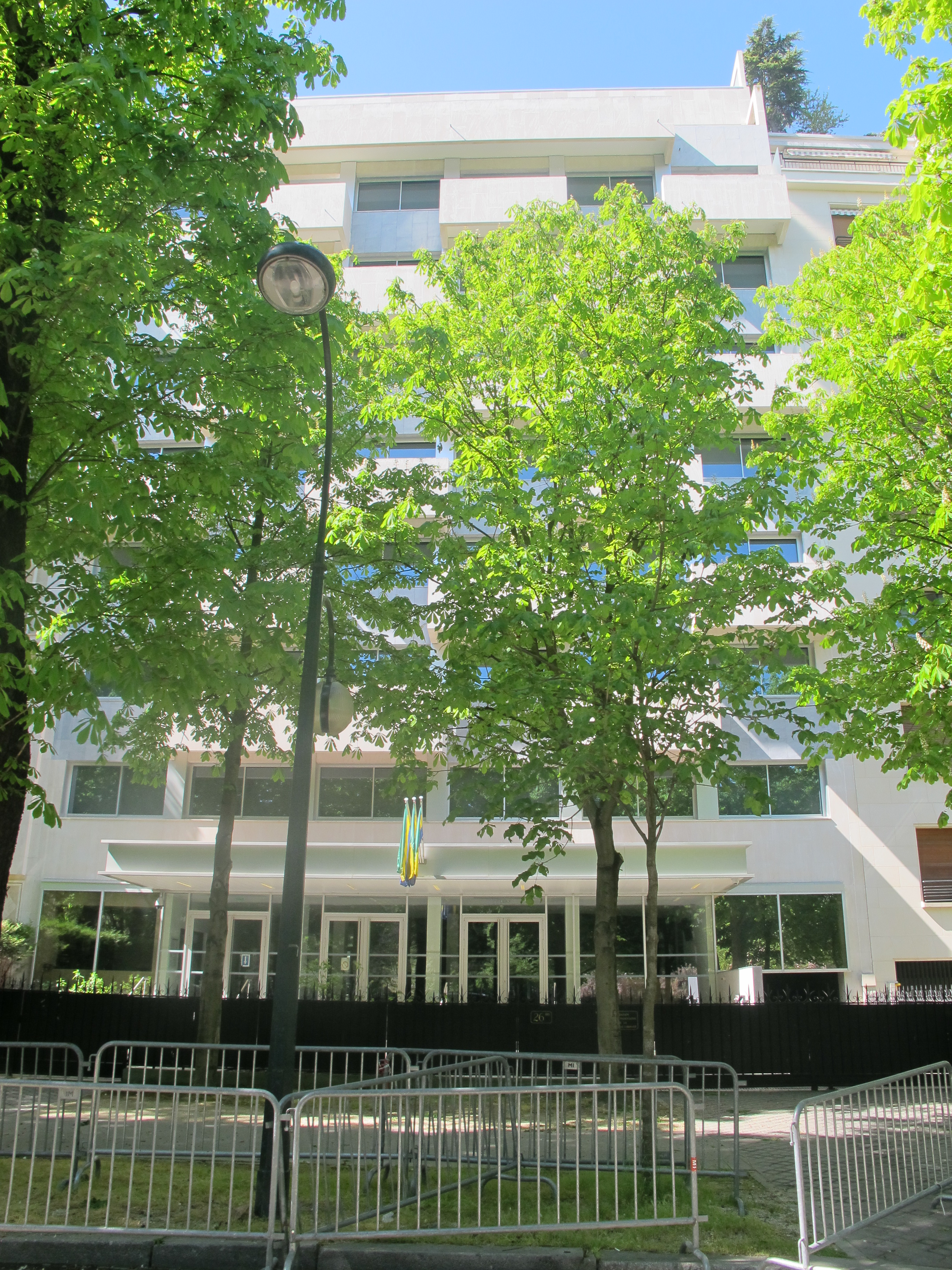 Ambassade du Gabon en France, 26 bis avenue Raphaël (Paris, 16e).